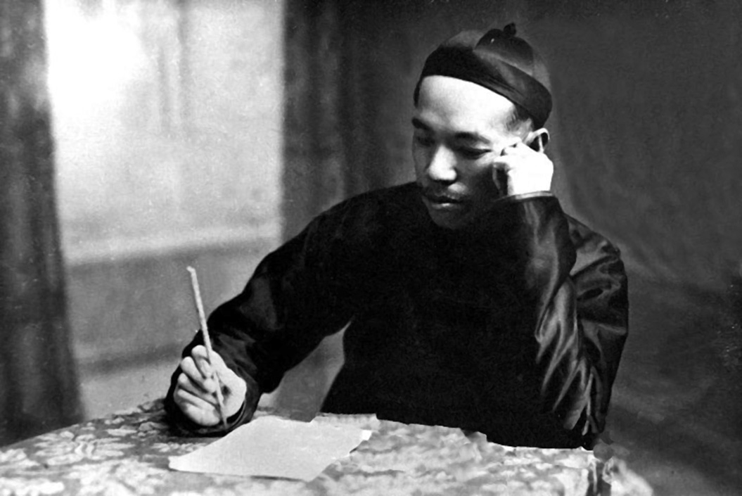 Лян Цичао